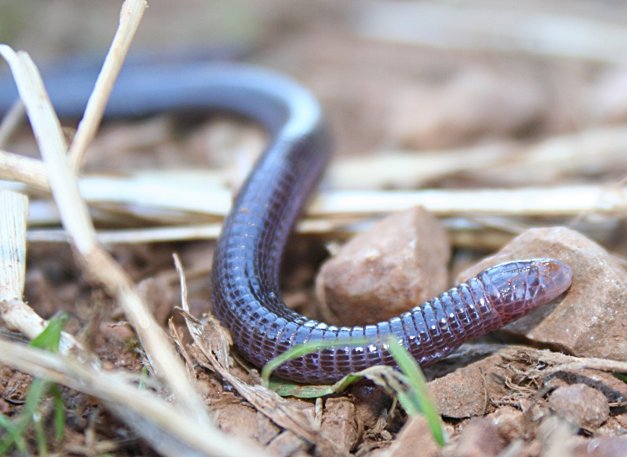 Anfisbenio en Cáceres, Extremadura (España).